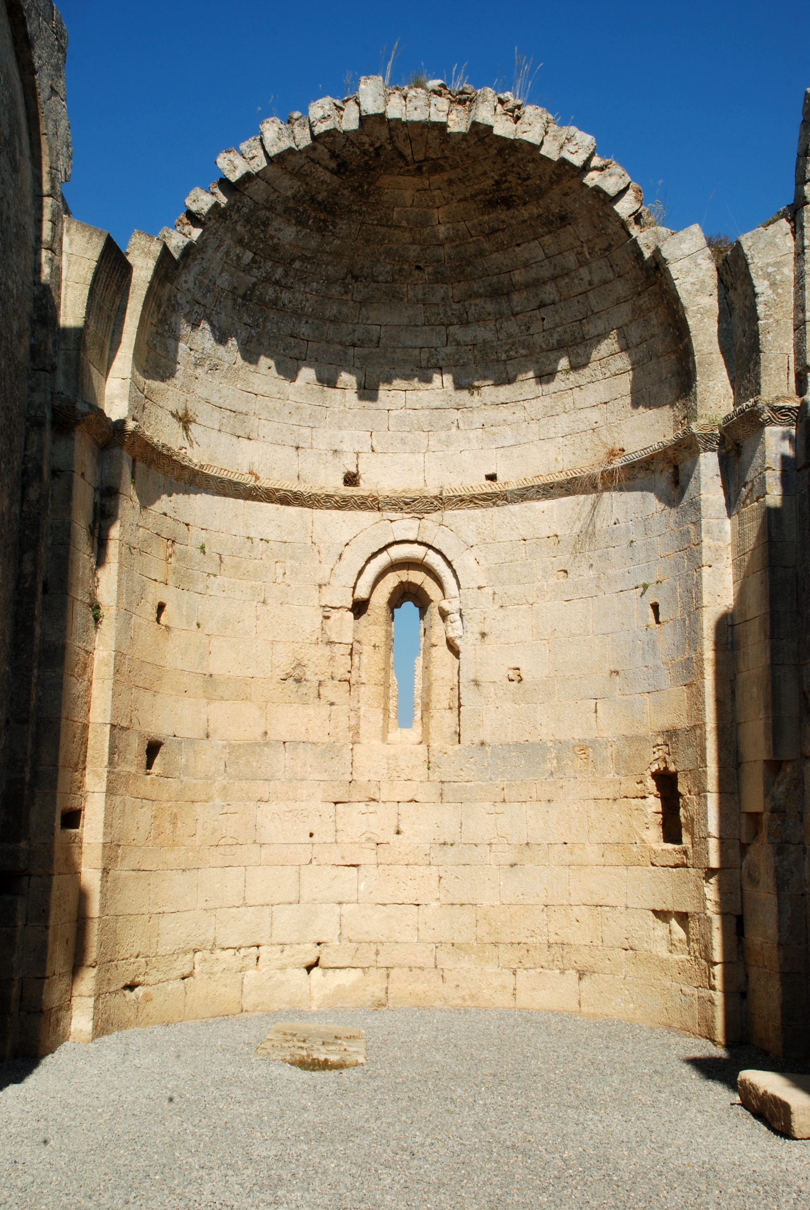 France - Gard - Église Saint-André de Souvignargues